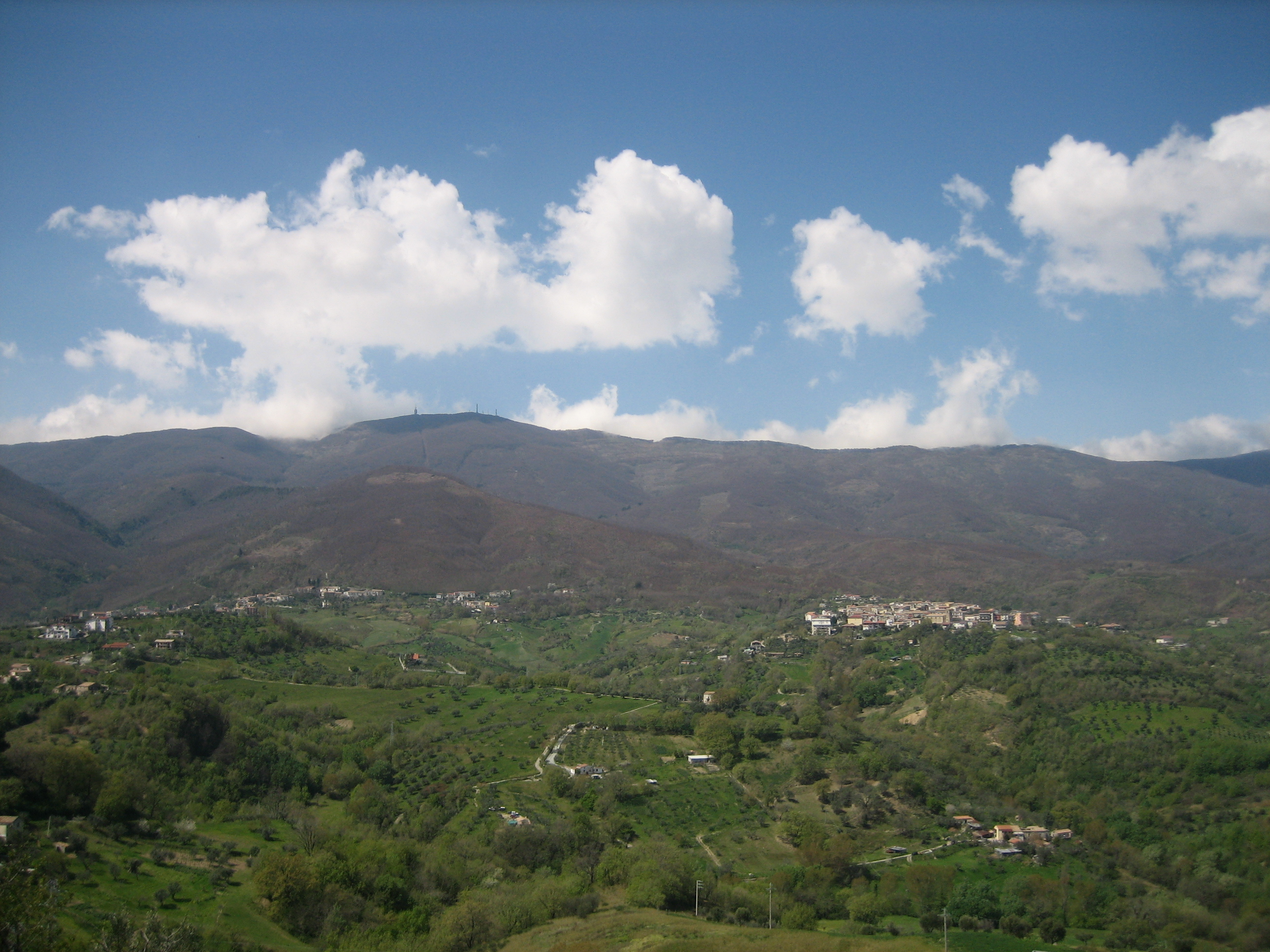 Vaccarizzo visto da Montalto. Sullo sfondo la catena costiera, oltre la quale c´é la cittá di Paola.